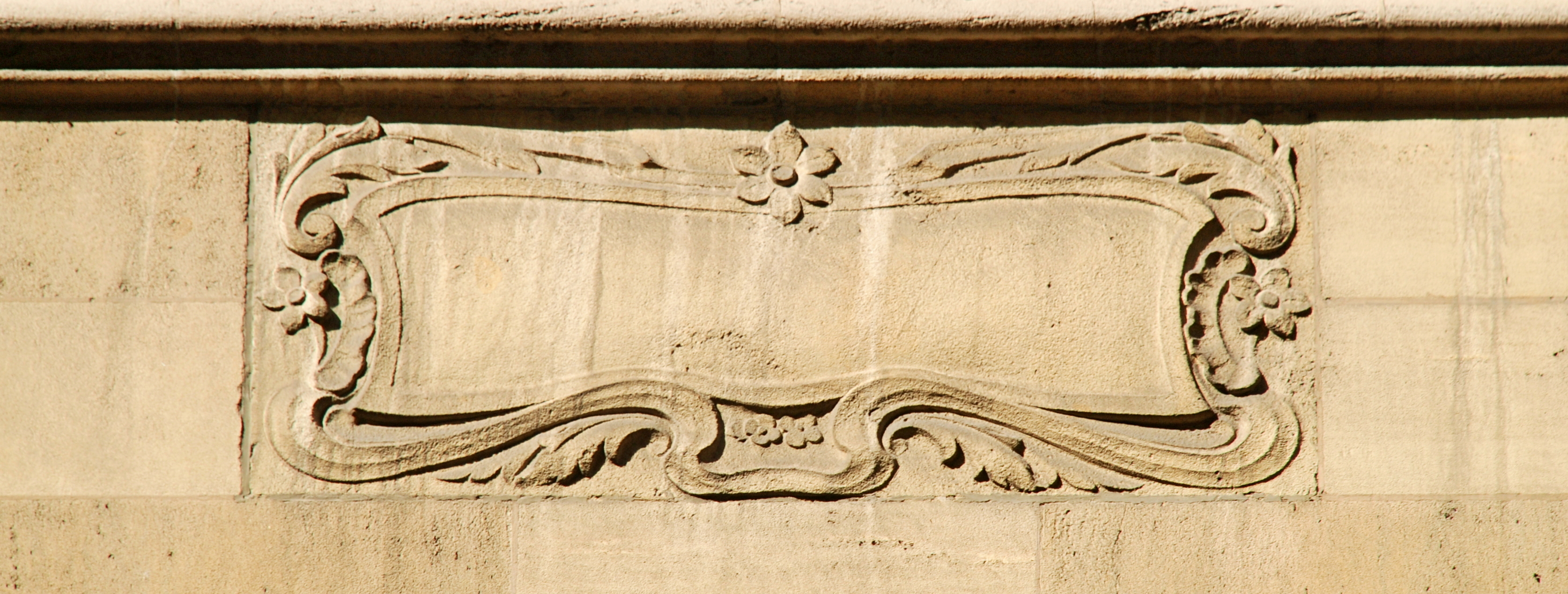 Belgique - Bruxelles - Forest - Avenue Albert 219 (Art nouveau, architecte Auguste Toisoul)